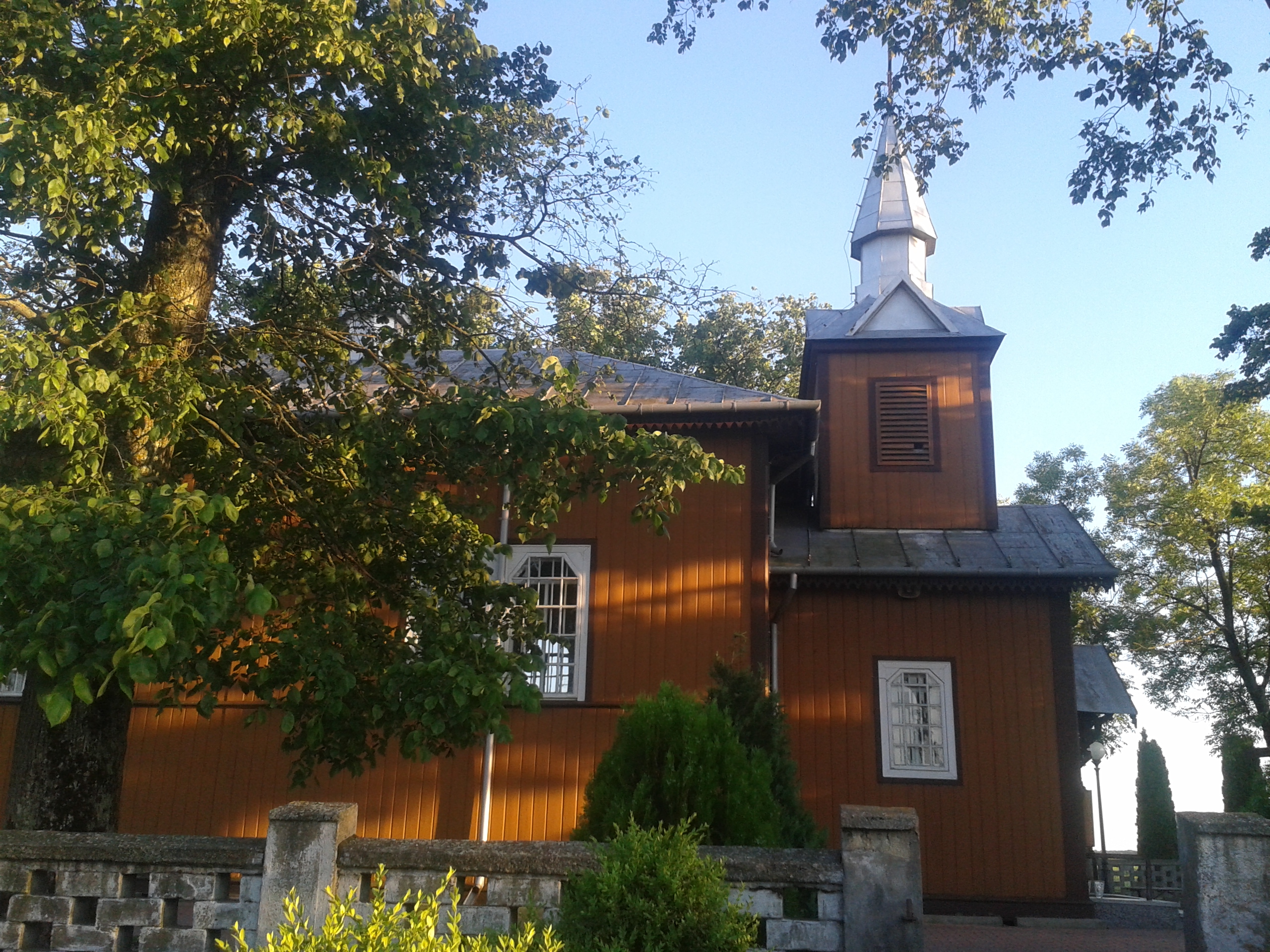 Dawna cerkiew, obecnie kościół, w Hrudzie